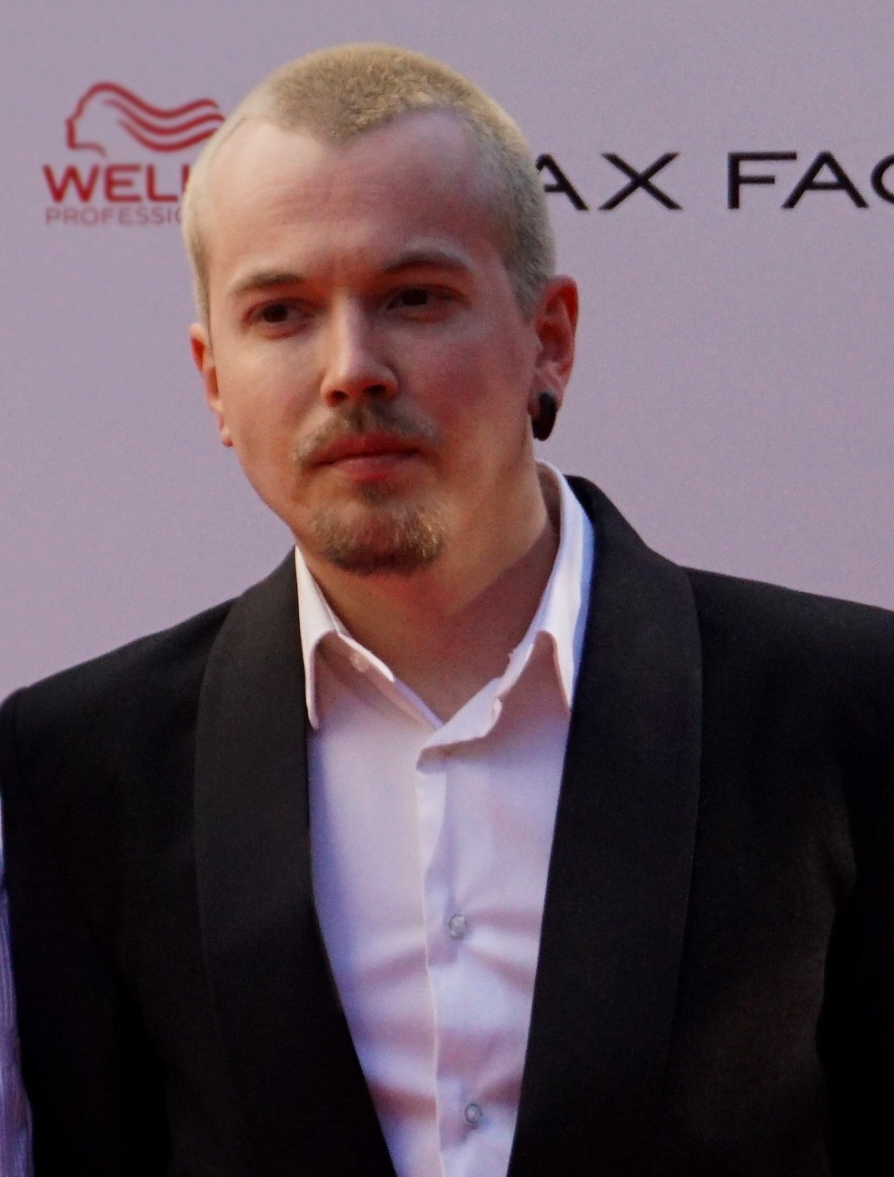 Иван Макаревич — российский актёр и музыкант.